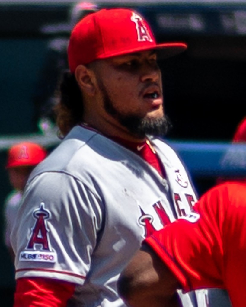 Los Angeles Angels VS. Cleveland Indians